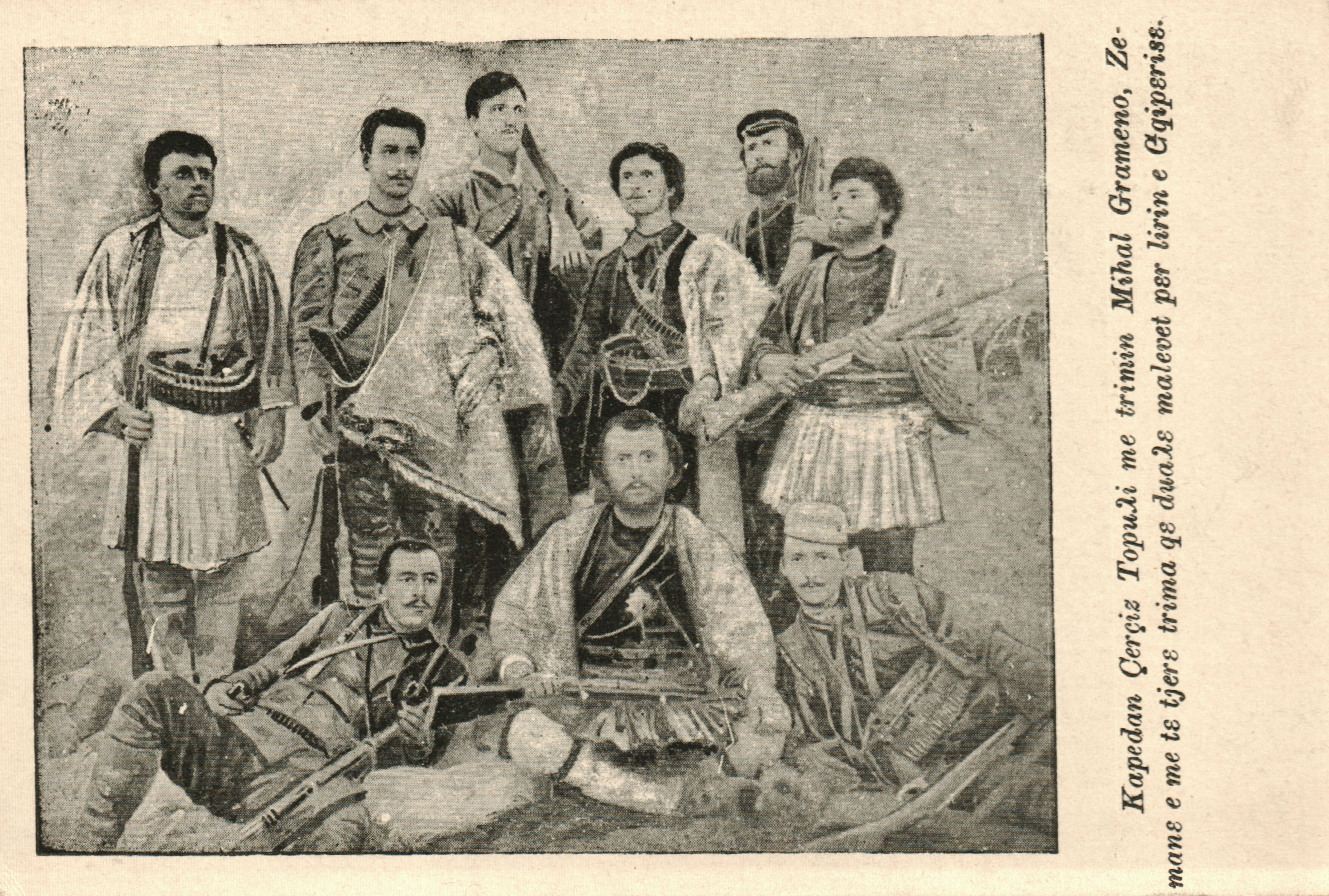 Снимки и пощенски картички на албанци.